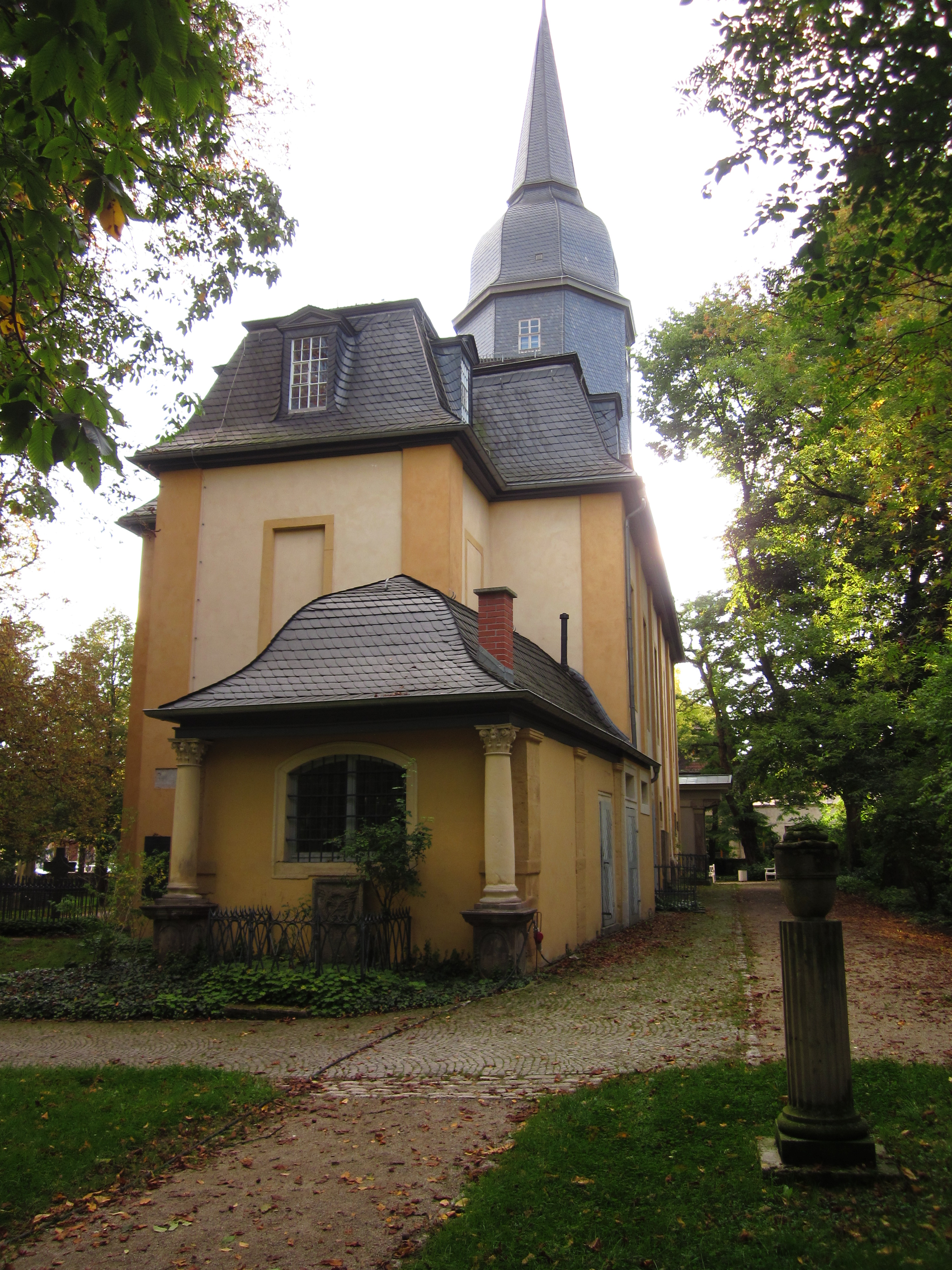 Denkmalensemble Altstadt, Jacobskirche, Kanzelaltar 1817, Saalkirche, 1712-13 von Johann Mützel+Christian II Richter, ab 1774 Hofkirche